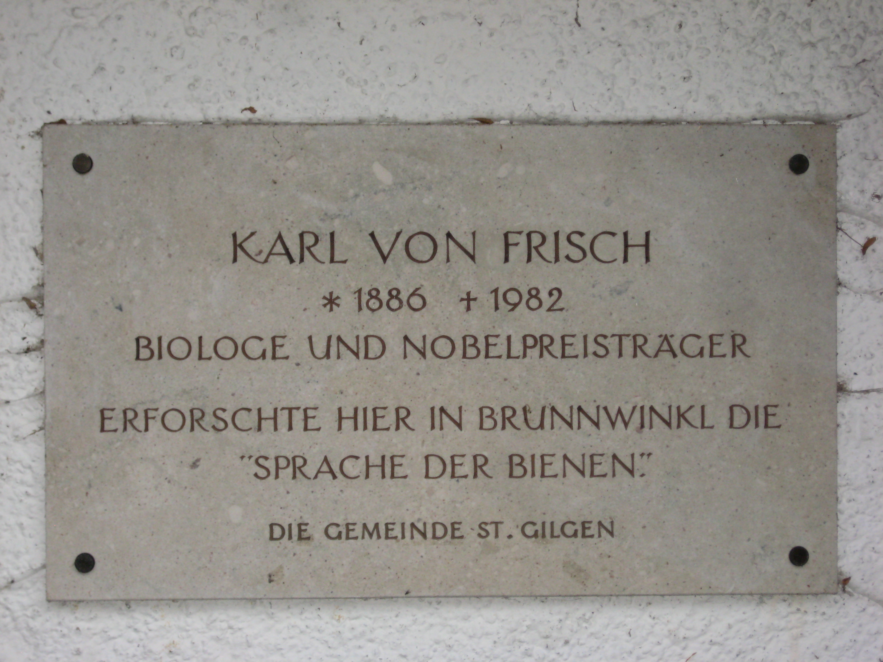 Seehaus (ehem. Sägemühle), Müllerstöckl und Eselstall